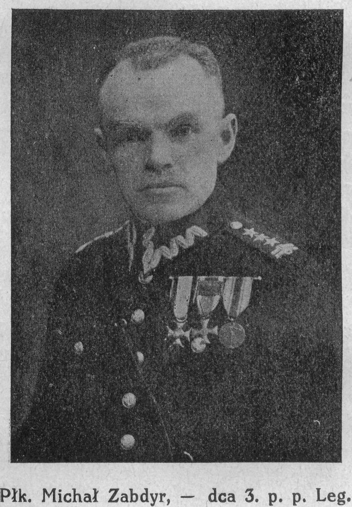 Pułkownik Michał Zabdyr - dowódca 3 Pułku Piechoty Legionów (II RP)